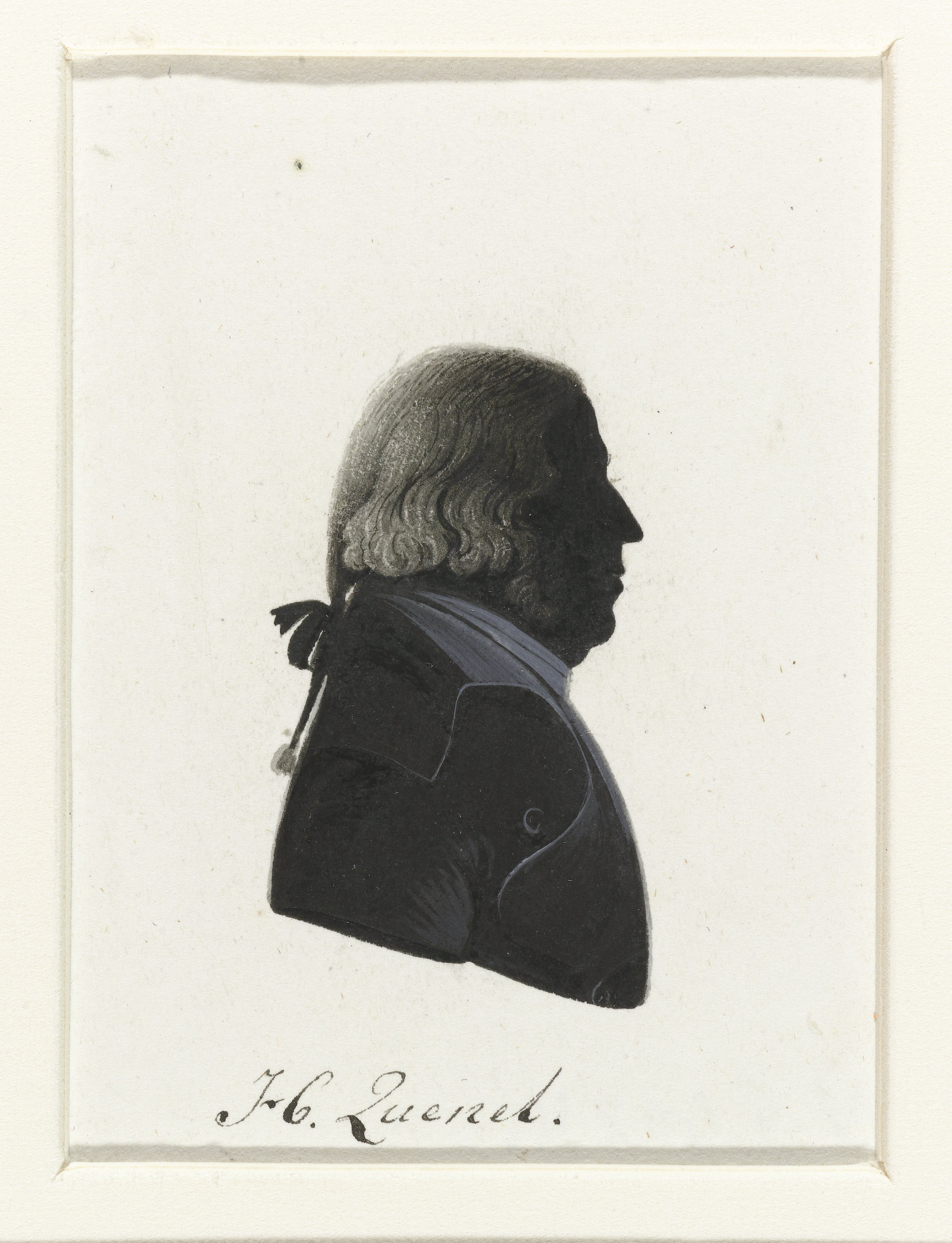 H. Quesnel. Tekening in Oost-Indische inkt, waarschijnlijk gemaakt door Hausdorff. De tekening behoort tot een serie van portretten van afgevaardigden naar de Eerste Nationale Vergadering in 1796-1797. Van de serie werden gravures gemaakt die zijn afgedrukt in "Geschiedenis der staatsregeling, voor het Bataafsche volk", een boek van Cornelius Rogge (1799).